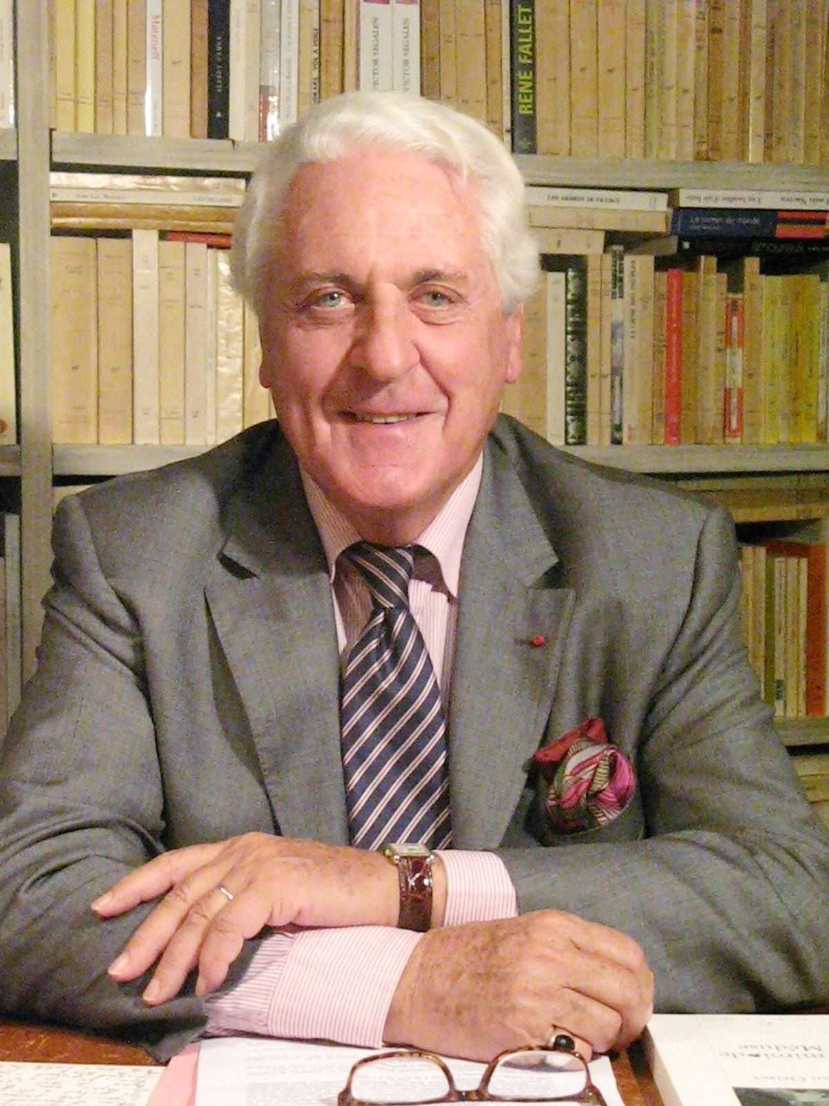 Le poète, écrivain et critique français Jean Orizet en octobre 2009.